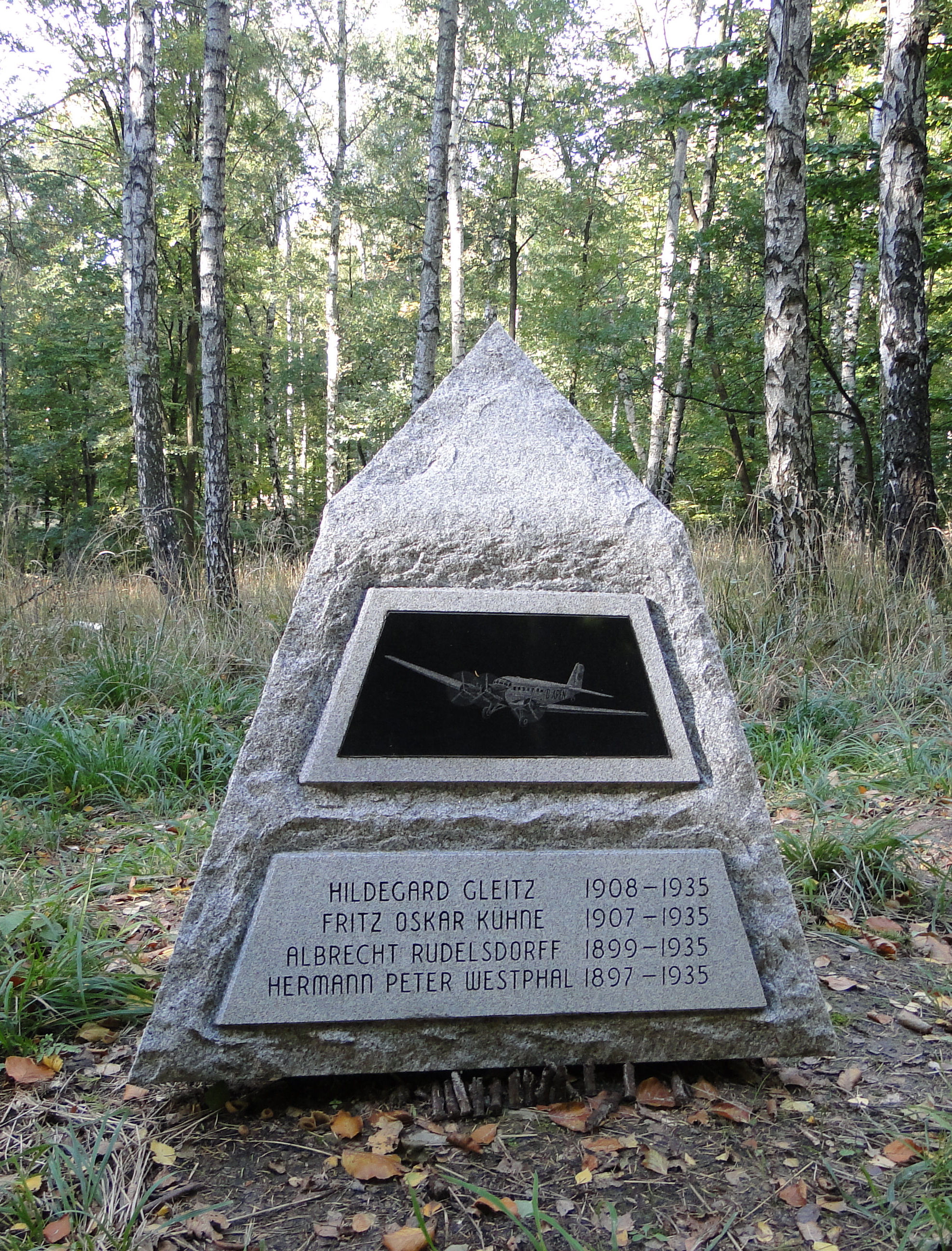 Pomnik ofiar katastrofy lotniczej 31.01.1935 pod Bukowcem koło Szczecina.